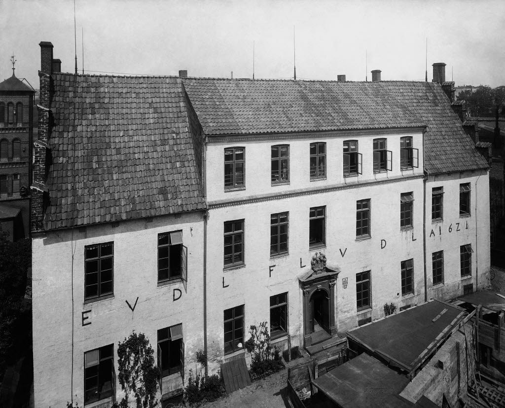 Dänische Straße 31, mit 5 m hohem Sandsteinportal.